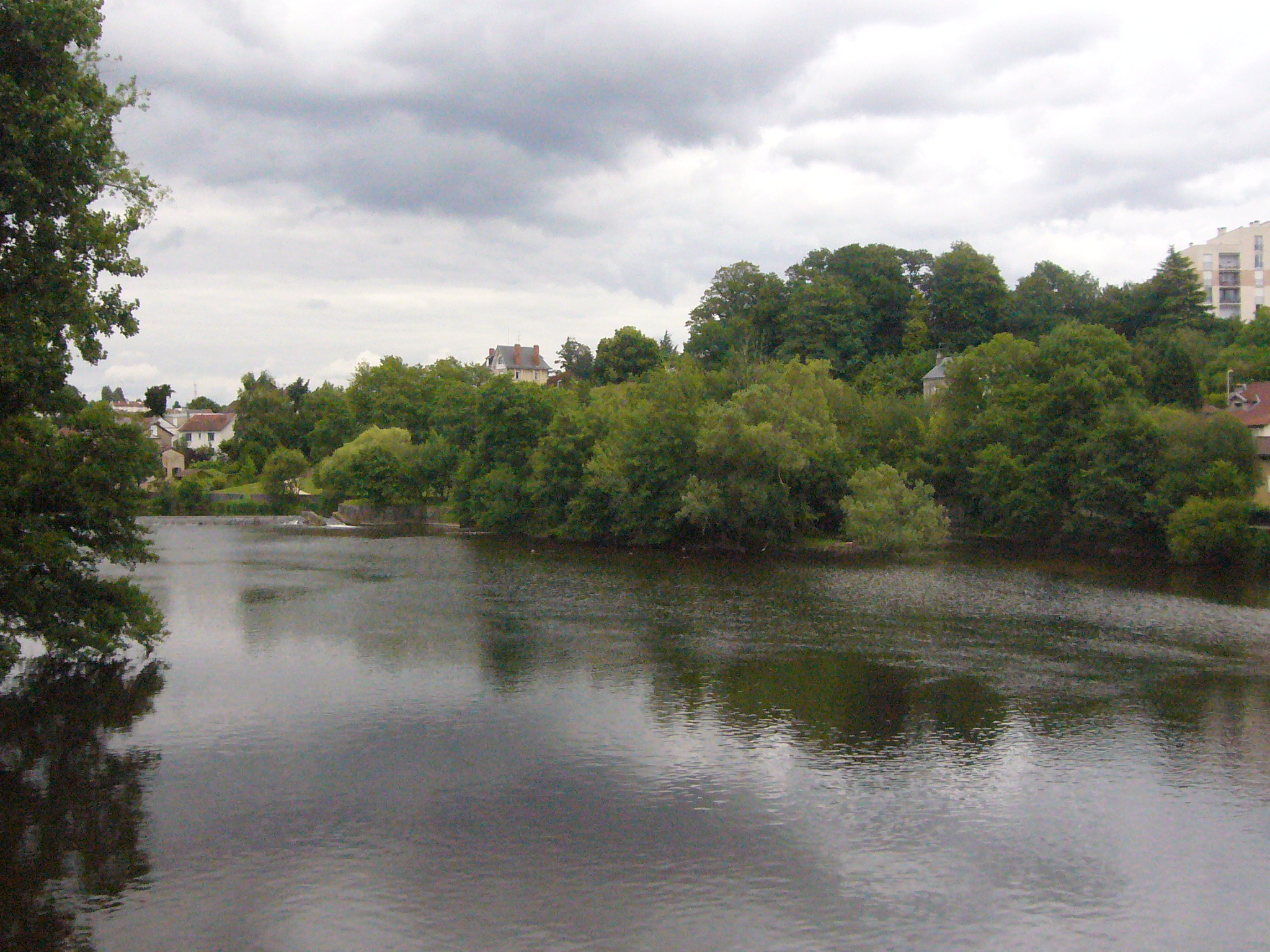 La coulée verte des Bords de Vienne, au niveau de l'île aux Oiseaux, à Limoges (Haute-Vienne, France)